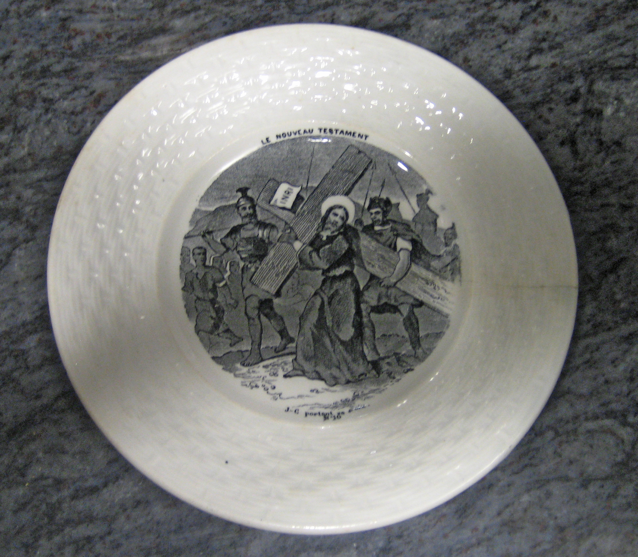 Plato de porcelana de Gien (Francia) de la serie Le Nouveau Testament Final del siglo XIX o principio del siglo XX